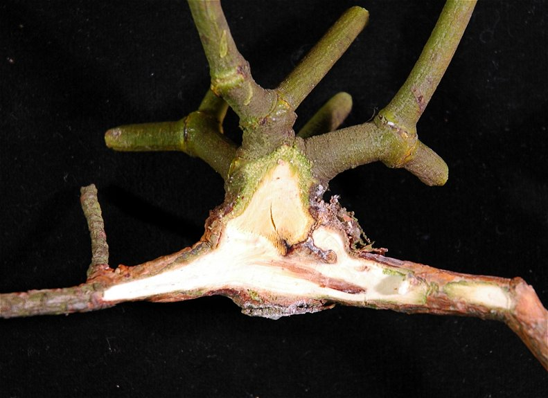 Viscum album subsp. austriacum / Mistel auf Kiefernzweig, angeschnitten